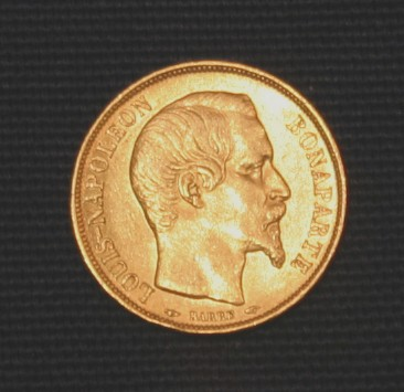 Louis Napoleon Bonaparte